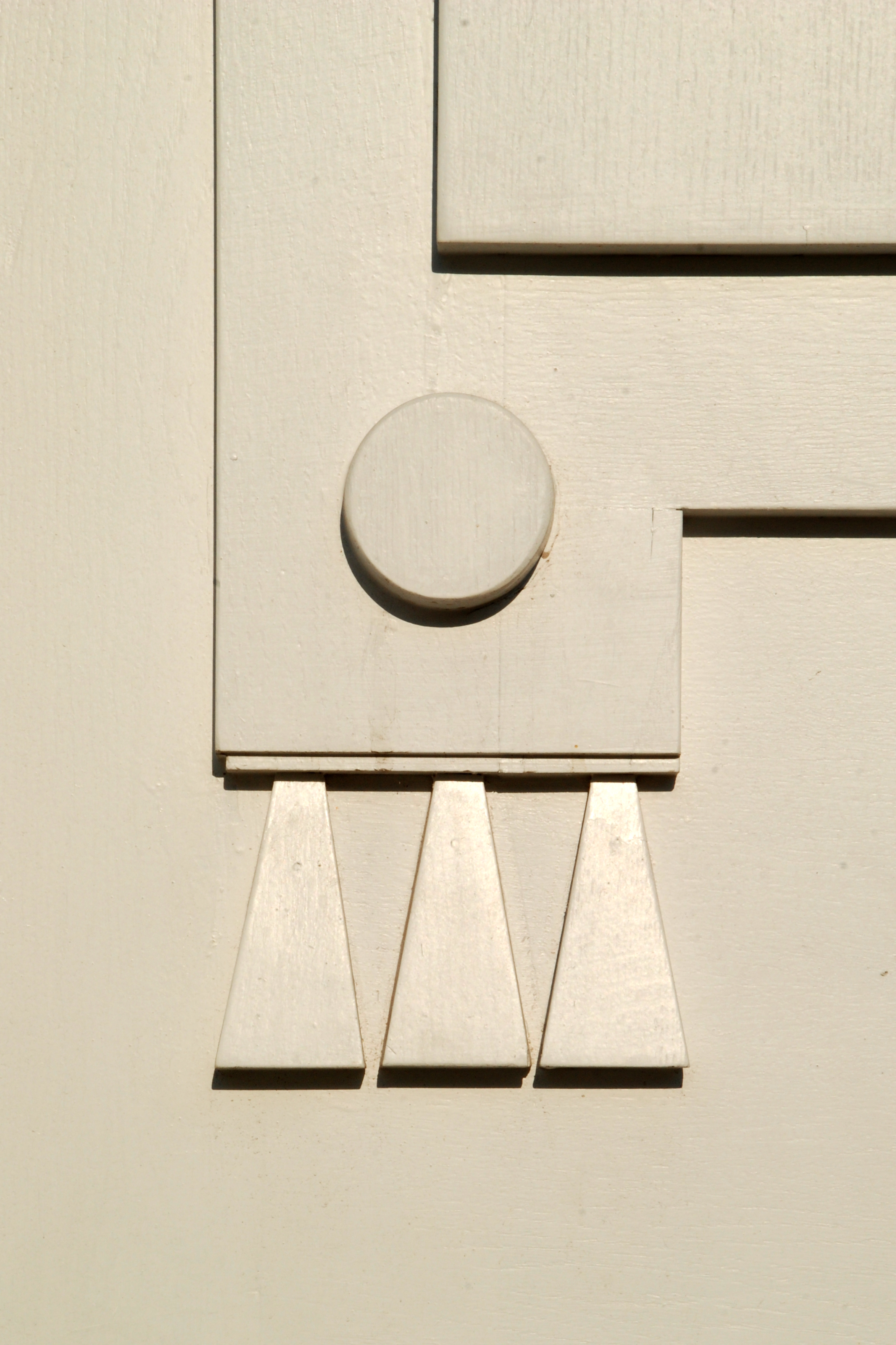 Bruxelles - Place des Martyrs - Motif de gouttes ornant une porte de style néoclassique